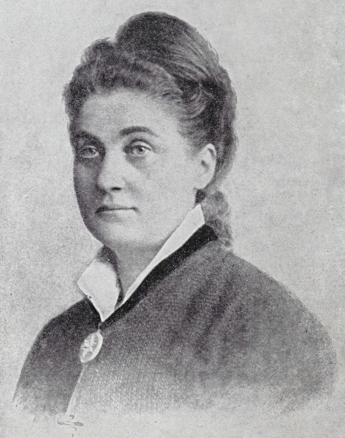 Foto von ca. 1880, Quelle: Dietmar Grieser, Wien.